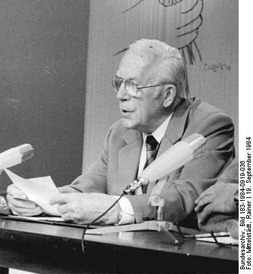 Title: Berlin, Manifestation, Hans Stubbe, Jo Jastram People in the image: Jastram, Joachim: Bildhauer, Mitglied der Akademie der Künste, DDR * Stubbe, Hans Prof. Dr.: Präsident der Akademie für Landwirtschaftswissenschaften, Genetiker an der Universität Halle, DDR (GND 118756133) Factual corrections and alternative descriptions are encouraged separately from the original description. Additionally errors can be reported at this page to inform the Bundesarchiv. Original historic description: ADN-ZB-Mittelstädt-19.9.1984-Berlin: Manifestation - Ihre Gedanken zum 35. Jubiläum der DDR schilderten auf der Manifestation der Wissenschaftler und Künster im Berliner Ensemble Prof. cm. Dr.Dr. h.c. Hans Stubbe (l.), Ordentliches Mitglied der Akademie der Wissenschaften der DDR und Ehrenpräsident der Akademie der Landwirtschafswissenschaften der DDR, und Prof. Jo Jastram, Bildhauer, Mitglied der Akademie der Künste der DDR.